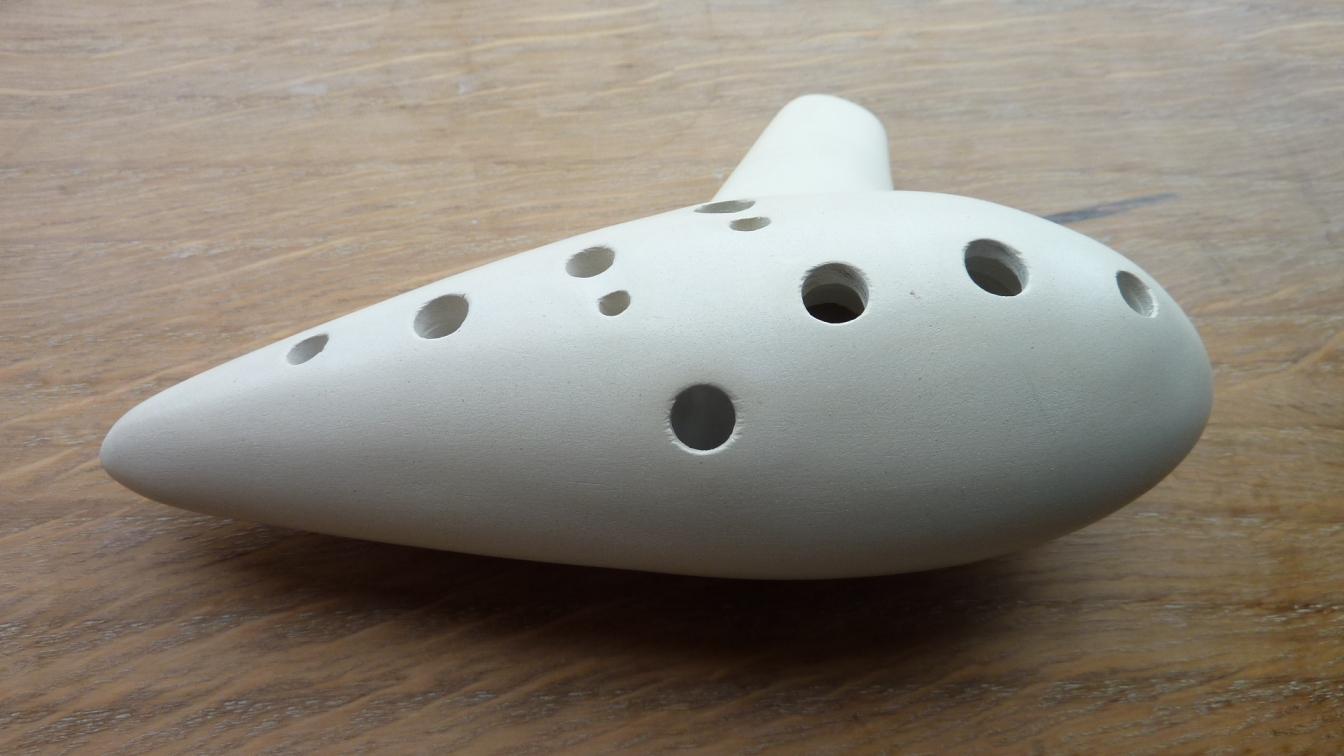 Ocarina monocamera a 12 fori in tonalità Alto C, range (da accordatore elettronico) A4--F6_Diteggiatura giapponese_ Modello denominato "Standard type" _Vista prospettica.